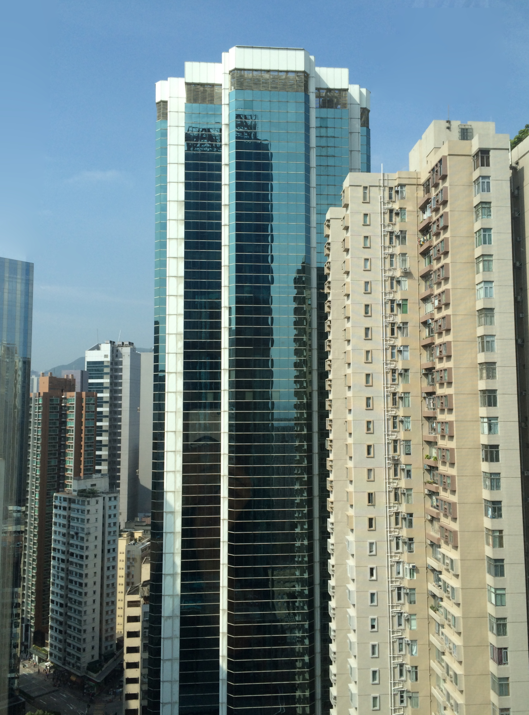 Convoy